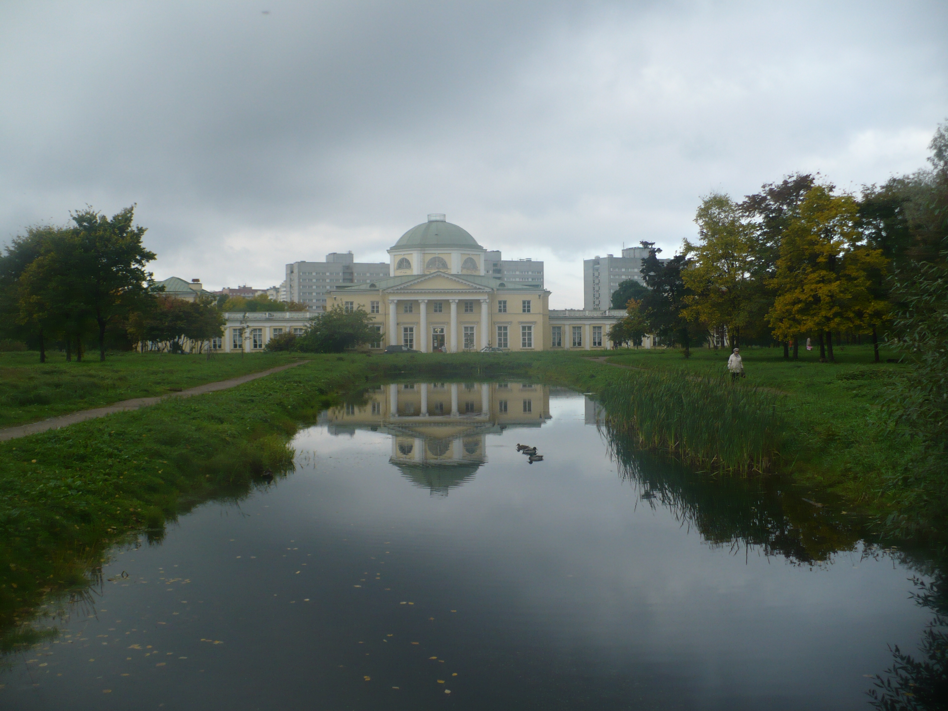 Усадьба Чернышёва "Александрино"